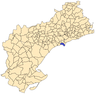 Situación de Salou en la provincia de Tarragona.